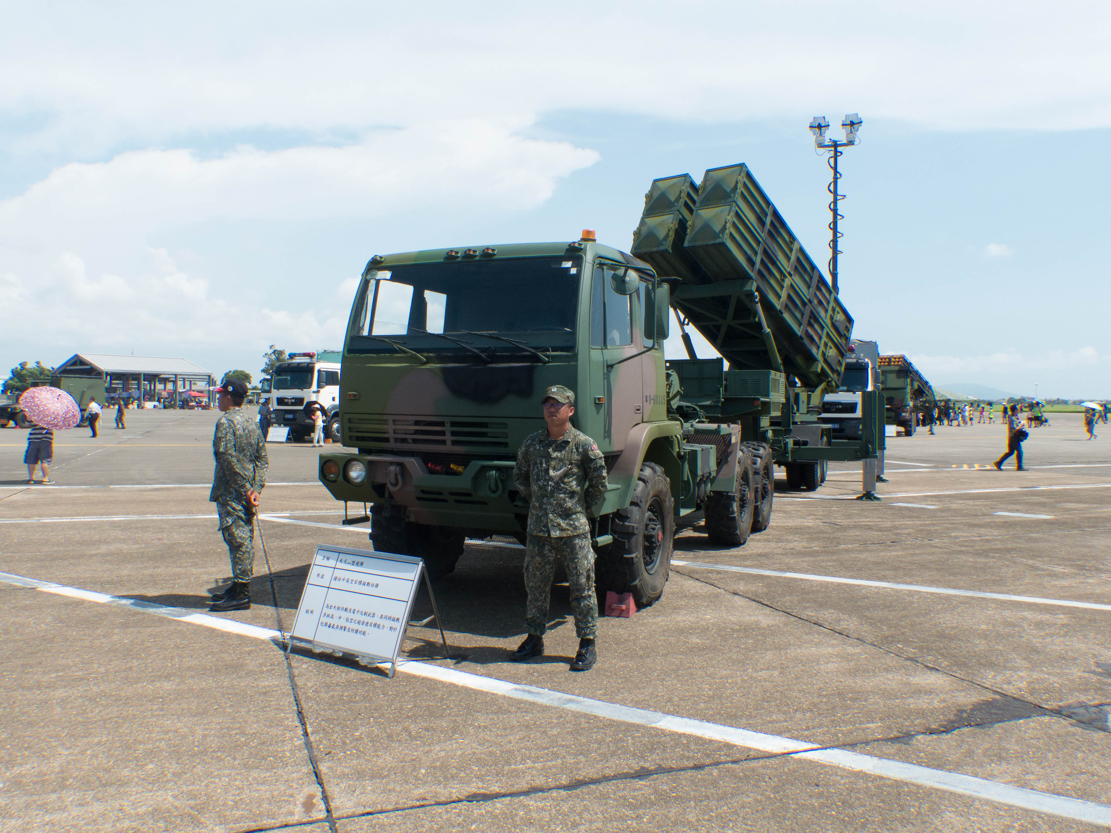 2017年空軍官校營區開放活動，停機坪靜態展示的陸軍天弓二型防空飛彈發射車與曳引重型卡車左前方。